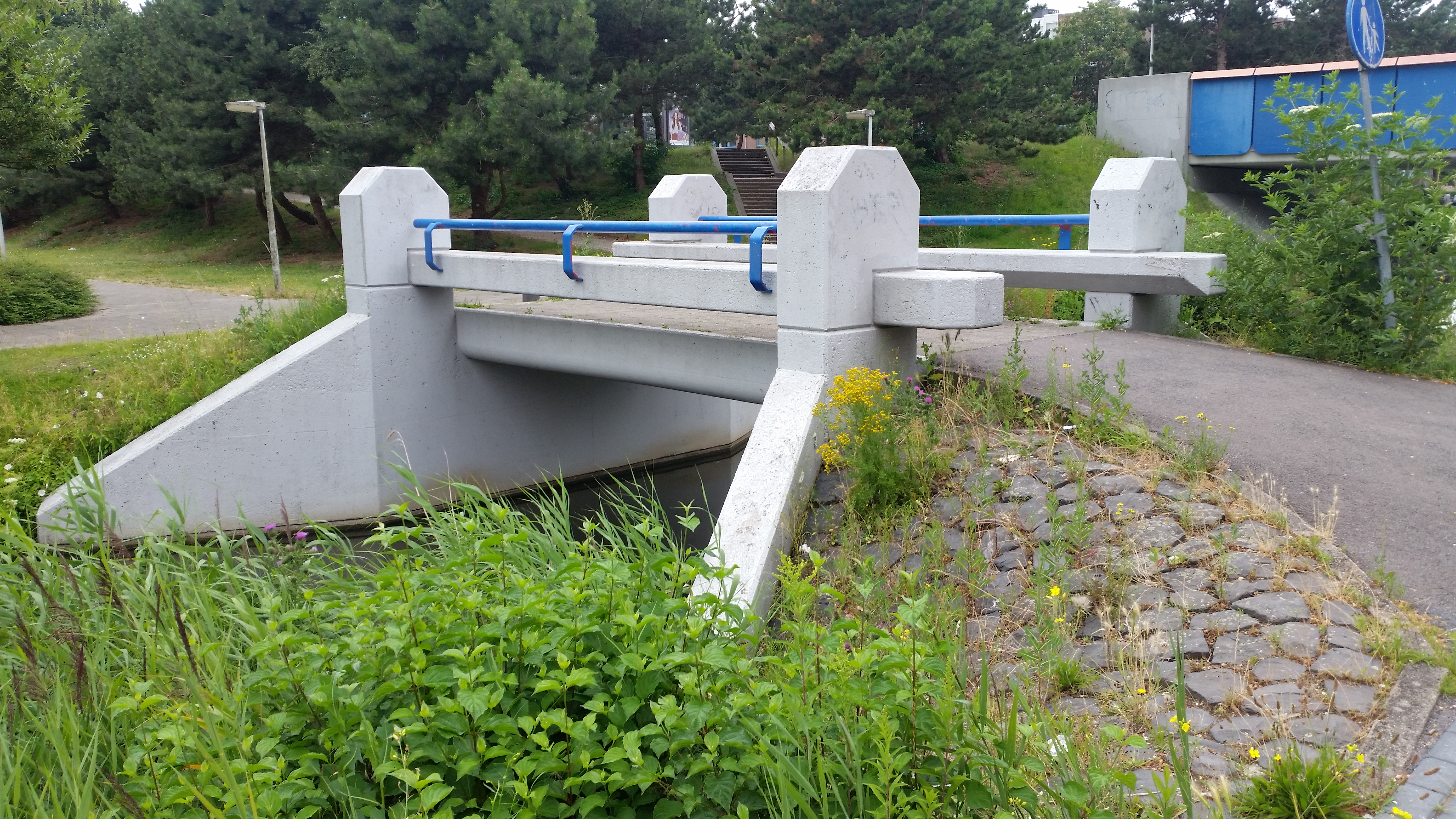 Leuningwerk van Brug 1345 (in Amsterdam)